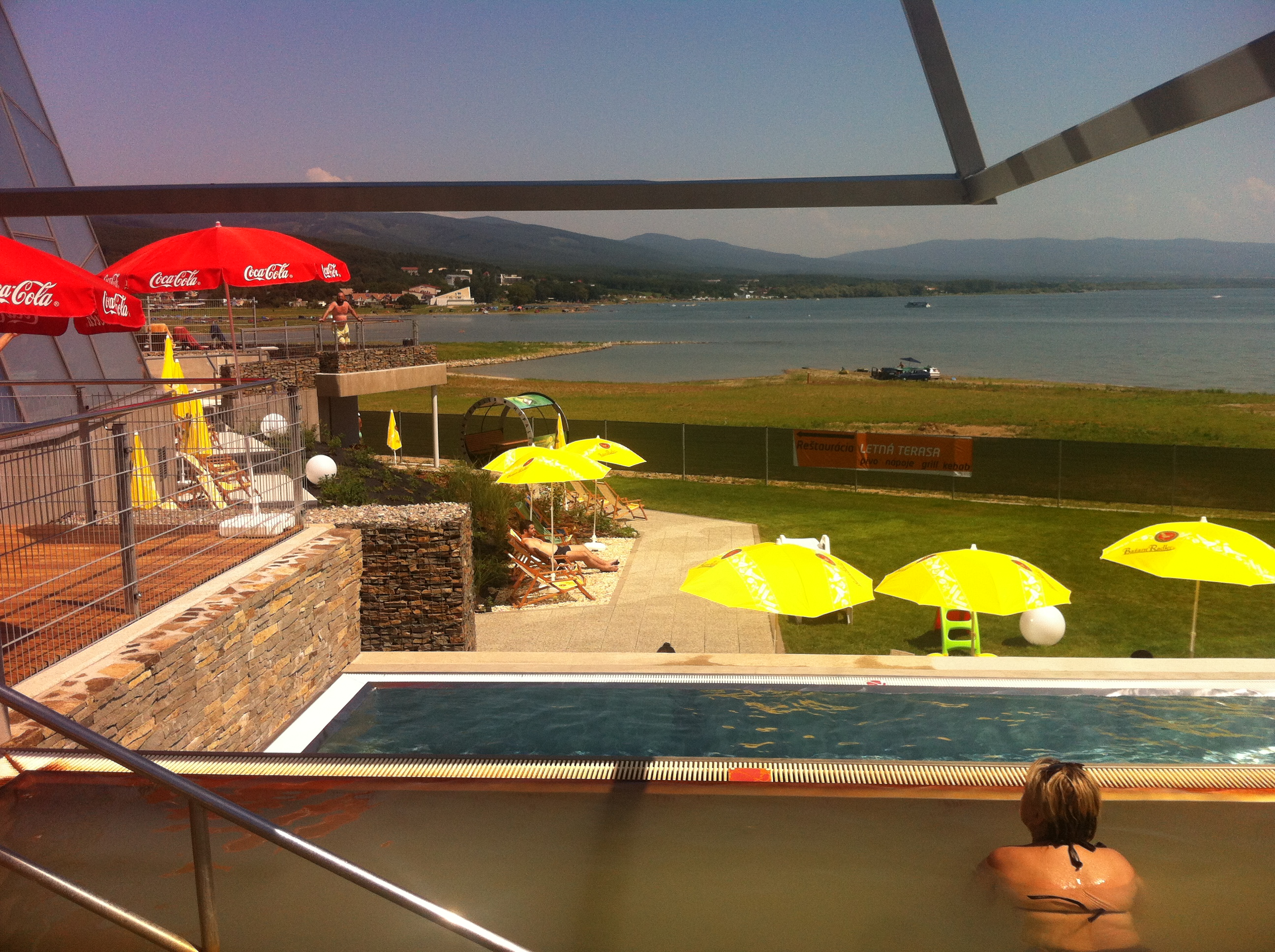 Akvapark Kaluža, Zemplínska šíravaSlovenčina: Aquapark Kaluža, Zemplínska šírava, Slovakia